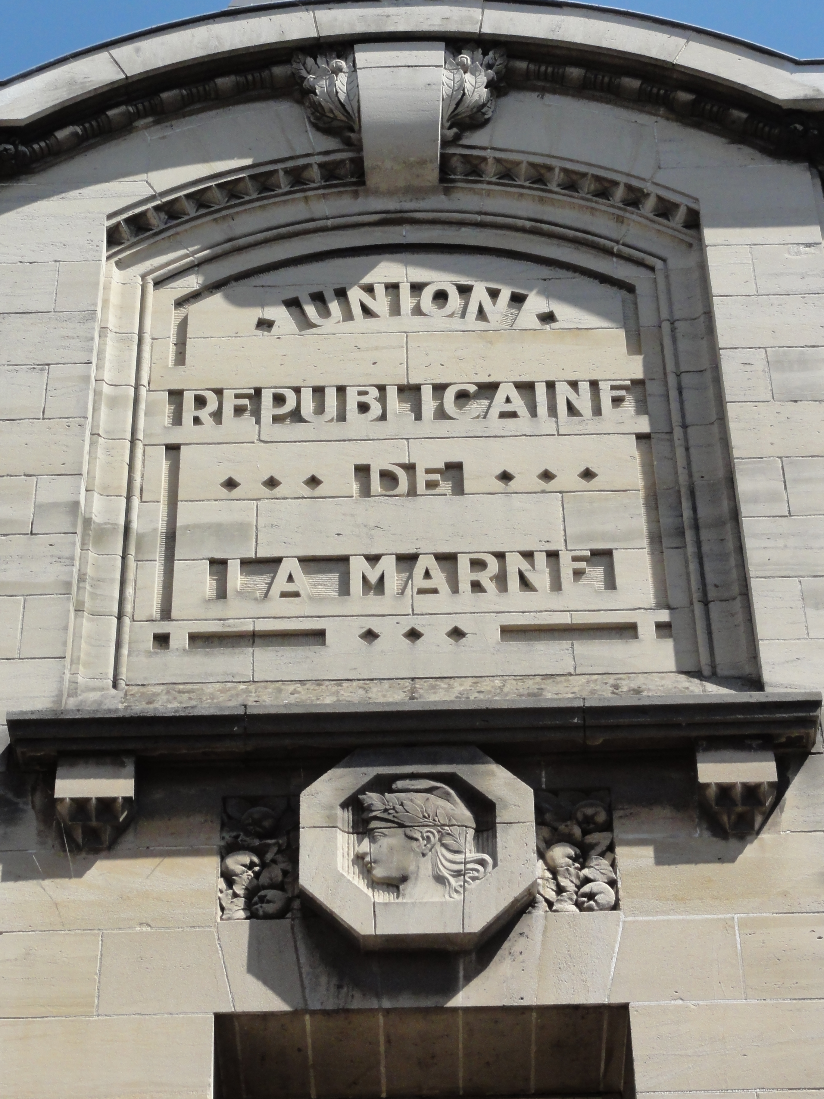 Châlons-en-Champagne Imprimerie Union Républicaine de la Marne